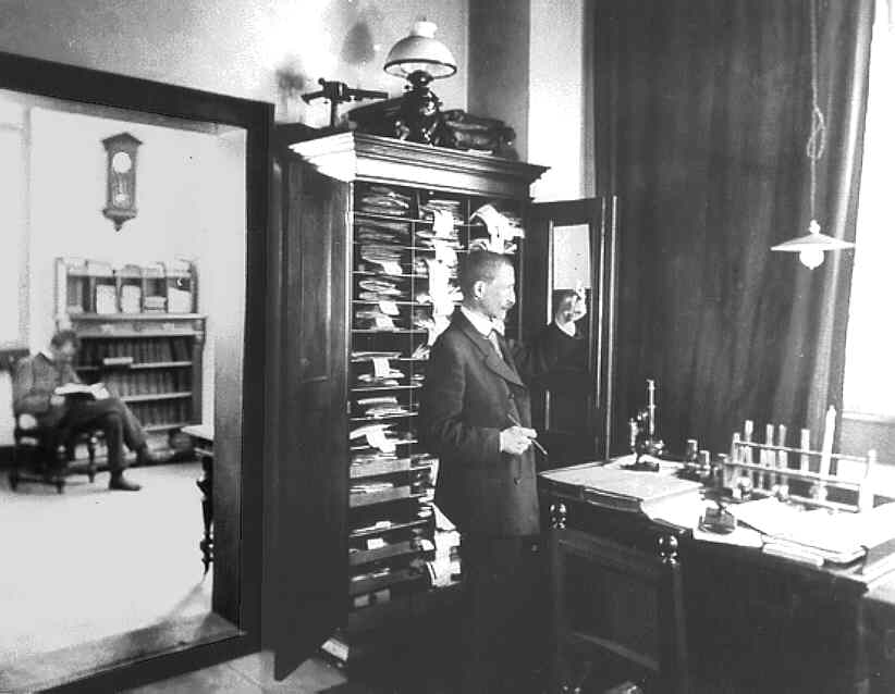 Labor Arthur Weinbergs in der Cassella-Anilinfarbenfabrik